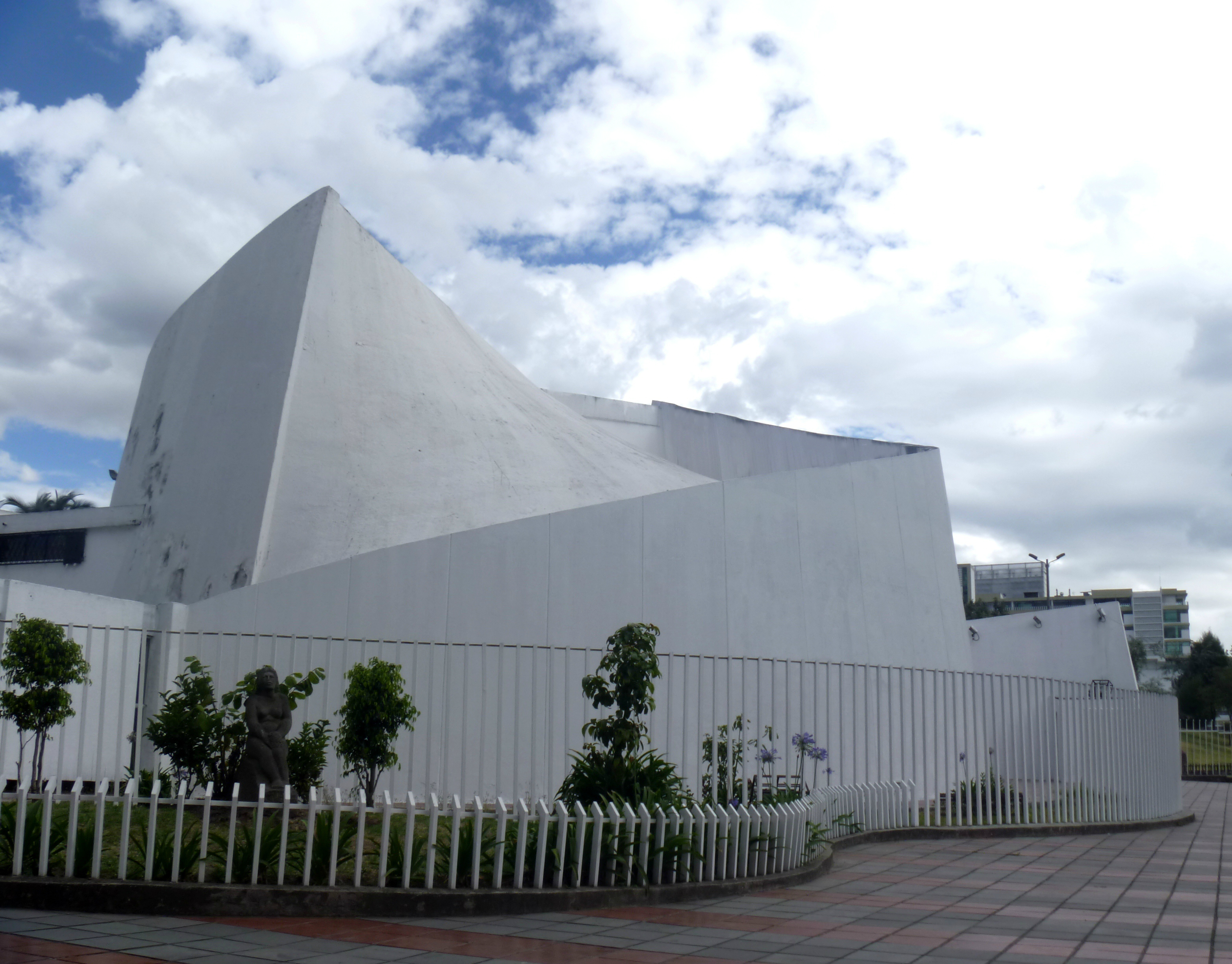 Teatro Promoteo, parte del complejo Casa de la Cultura Ecuatoriana, Quito.